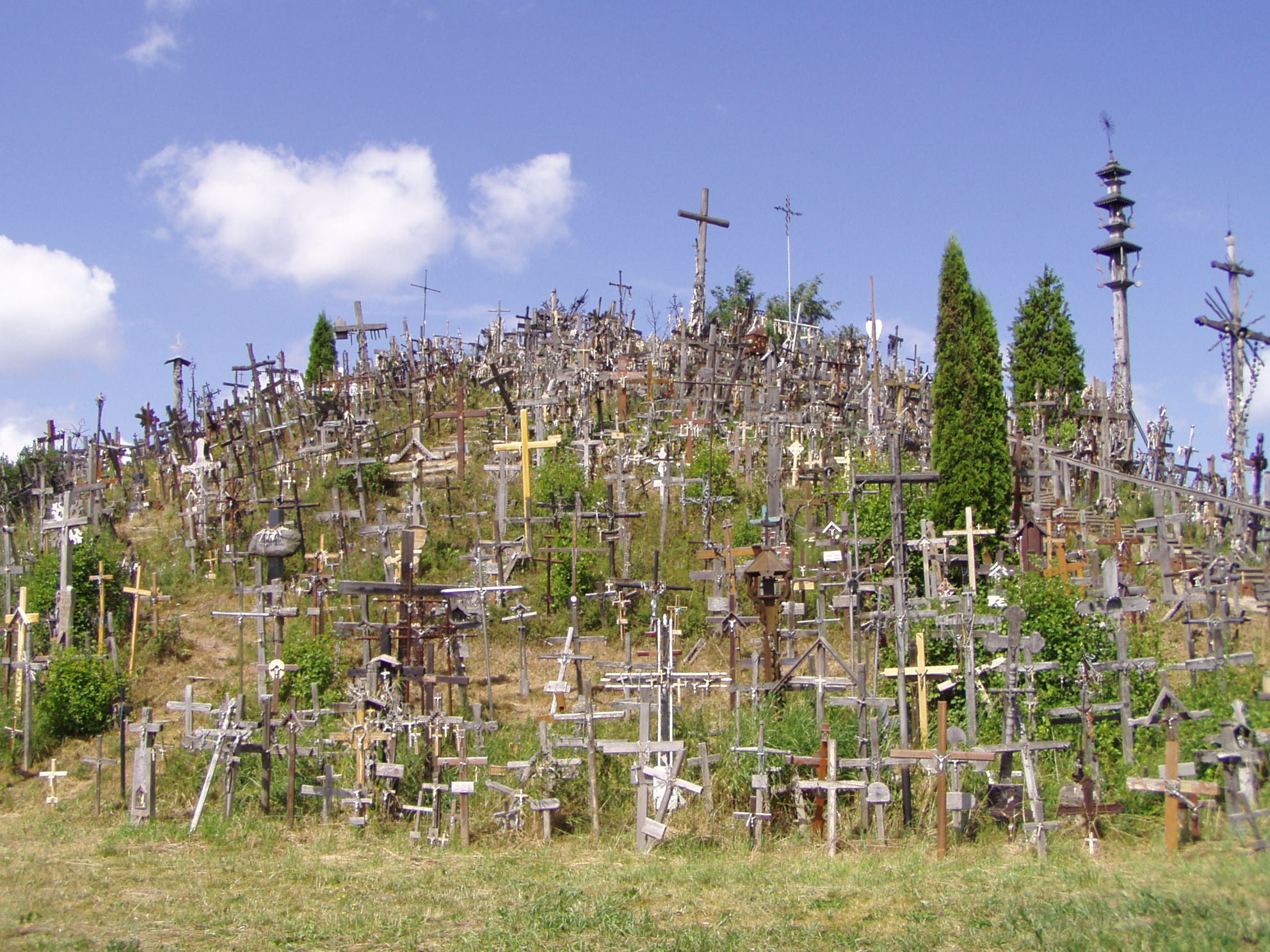 Szawle, Góra Krzyży